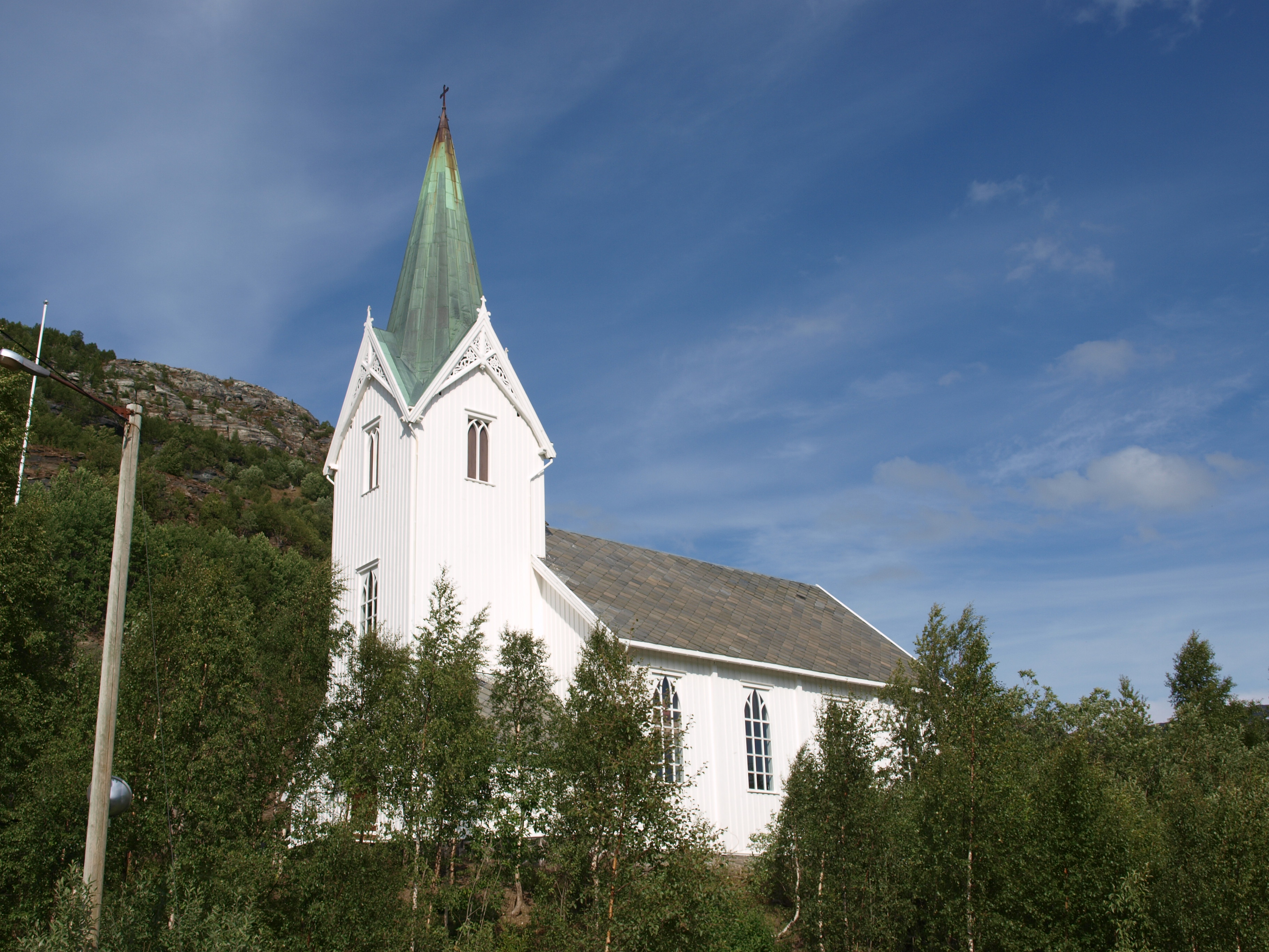 Sulitjelma kyrkje